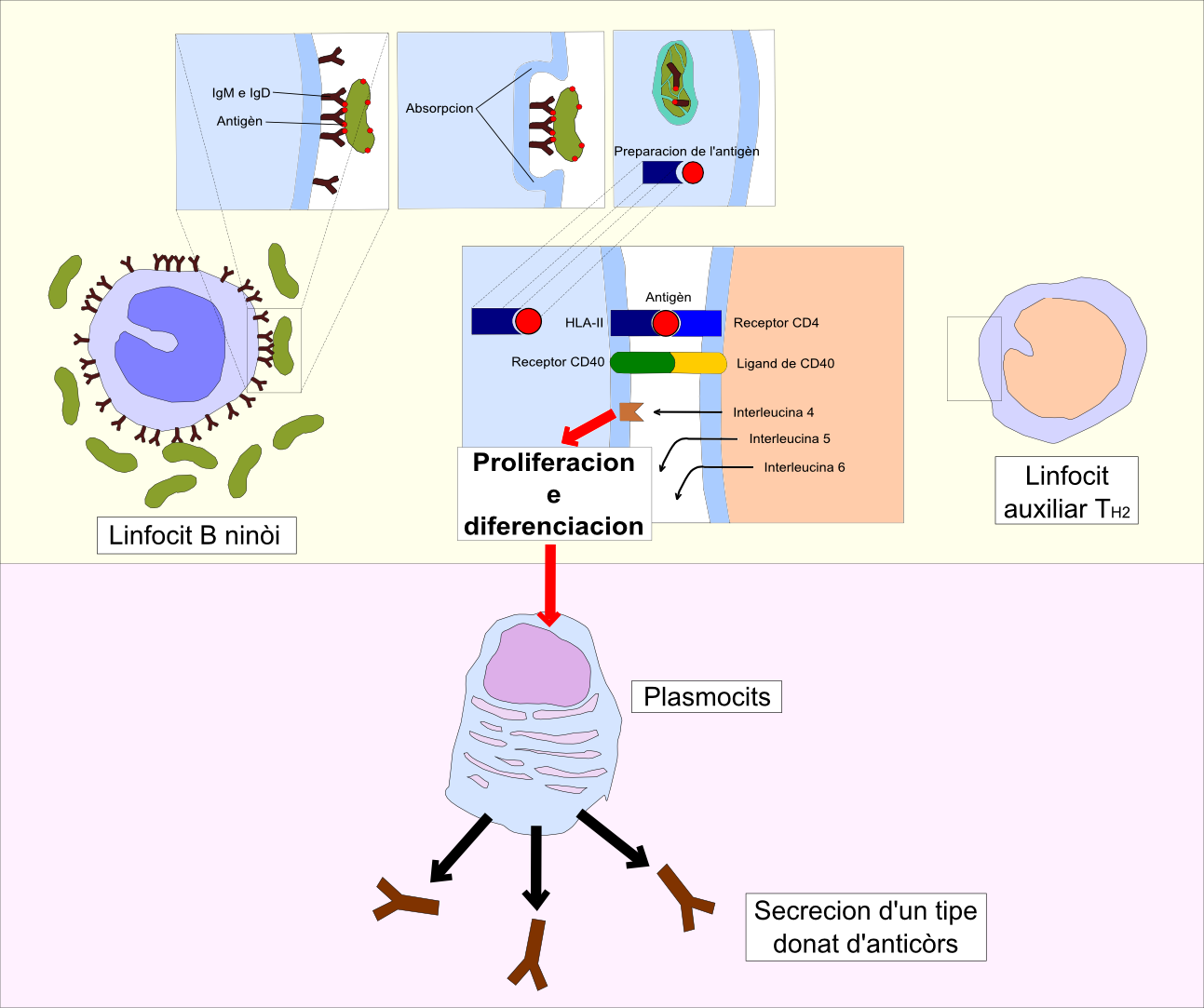 Activacion dei linfocits B dins l'òme.